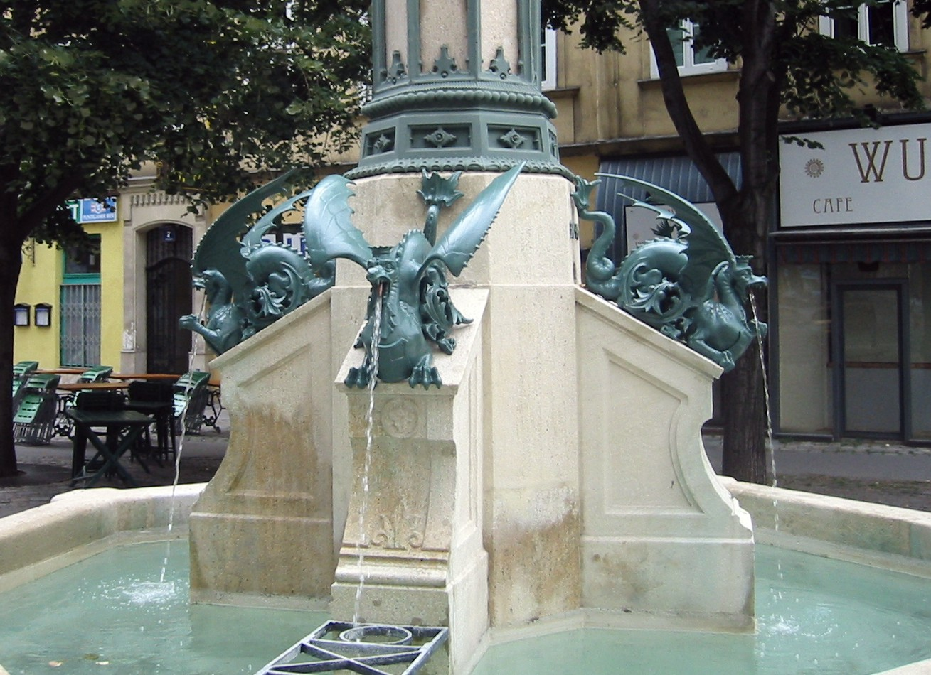 Wien Schutzengelbrunnen, Detail